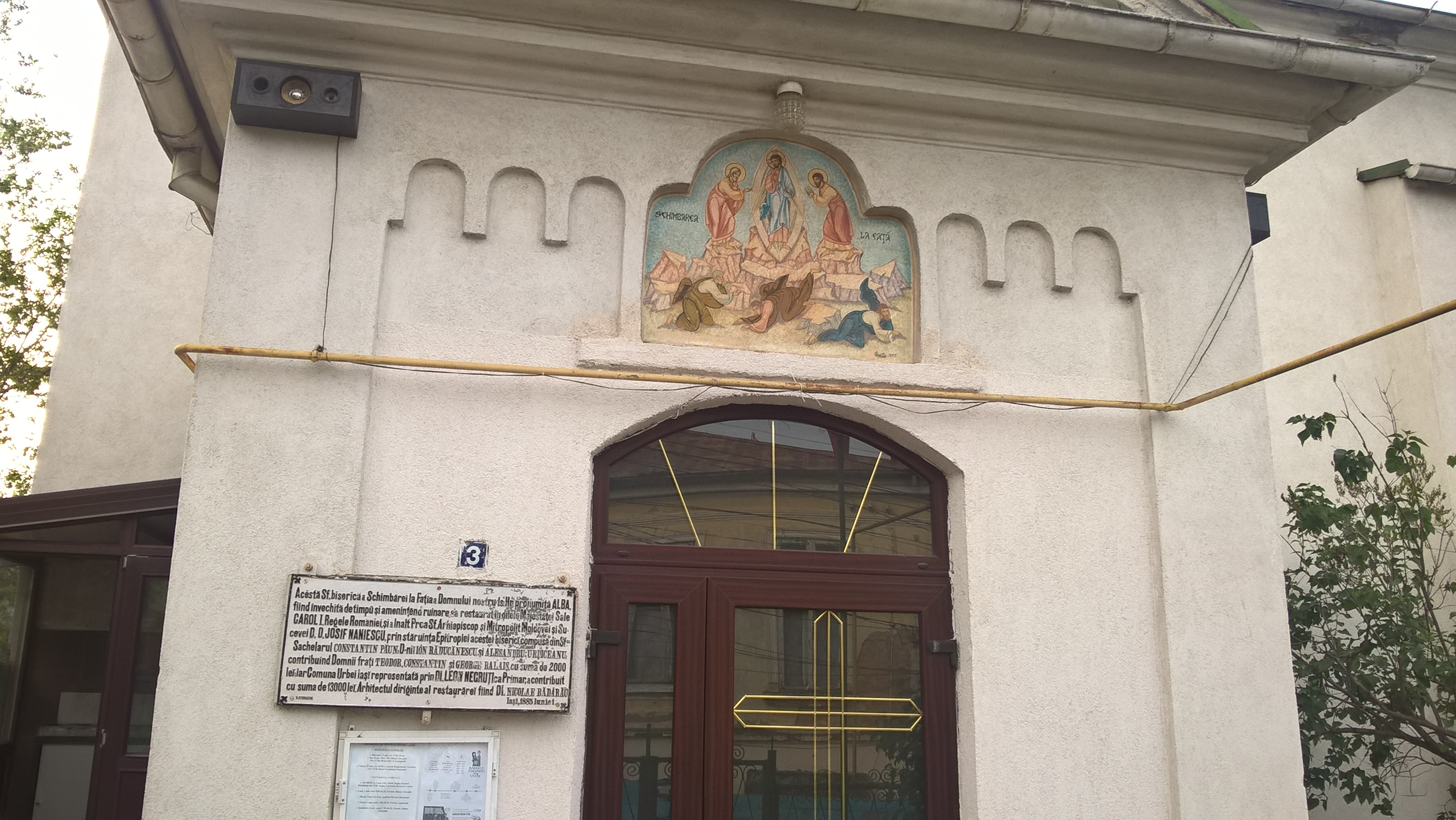 Wejście do cerkwi Przemienienia Pańskiego w Jassach i ikona patronalna